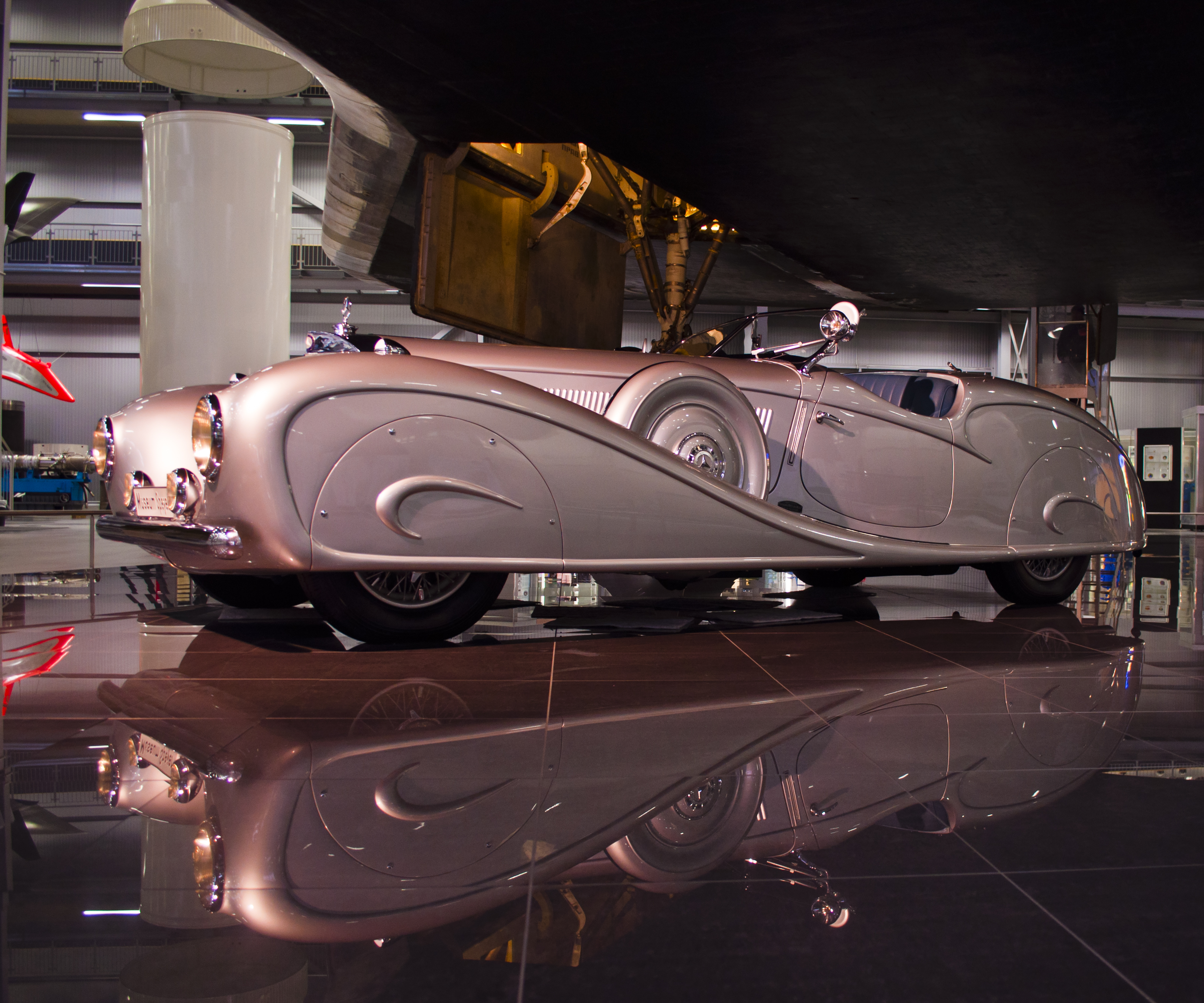 Mercedes-Benz 500 K mit Erdmann-&-Rossi-Karosserie im Technikmuseum Speyer unter Raumfähre Buran